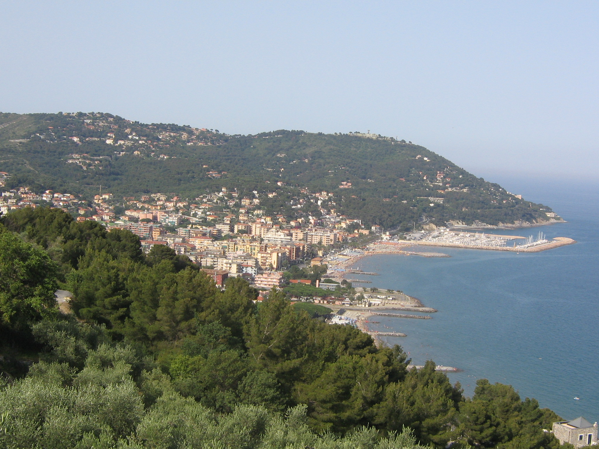 La baia di Andora vista da Rollo